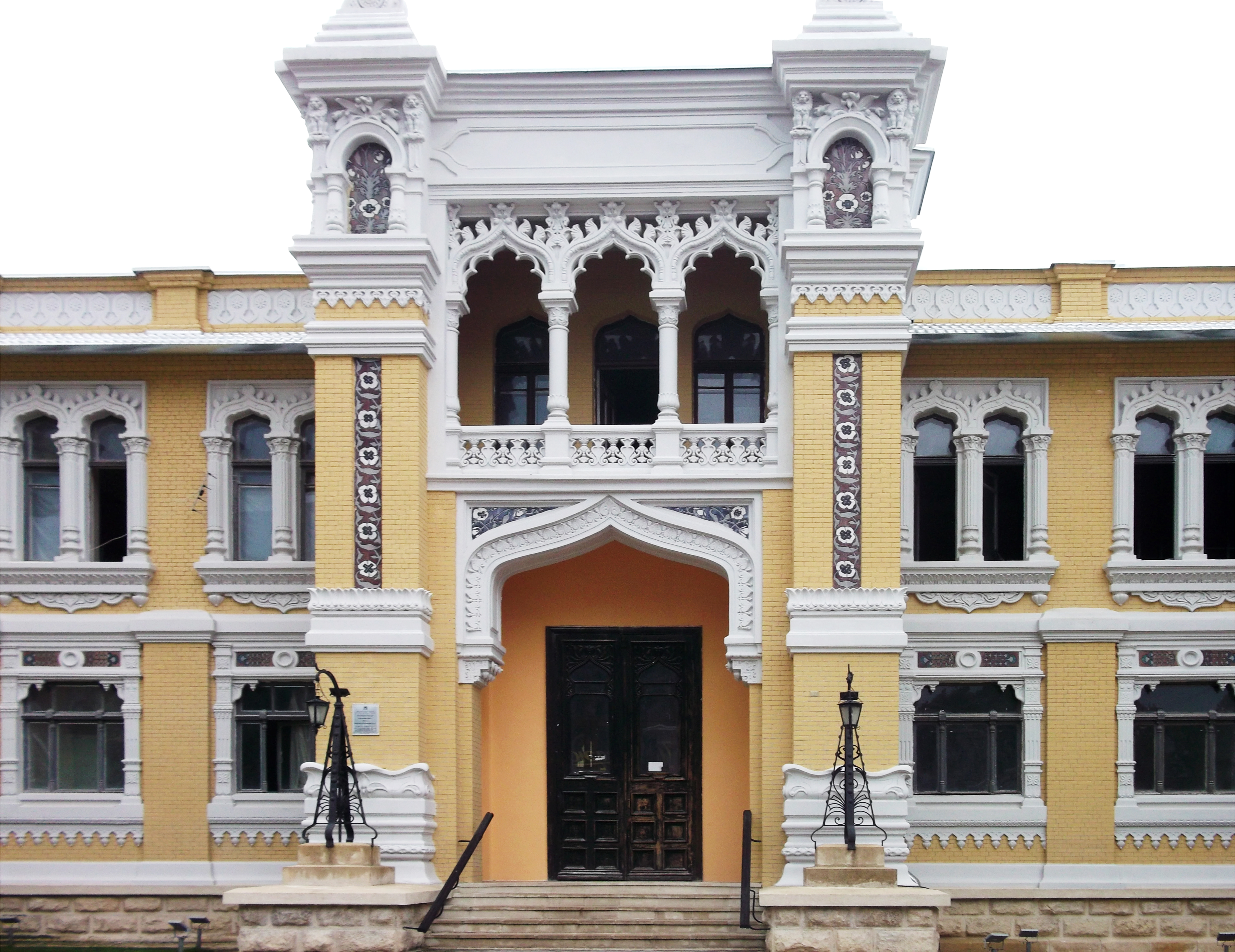 Комплекс Главных нарзанных ванн: бульвар Курортный, 4 (быв. проспект 50-летия Октября), Кисловодск, Ставропольский край